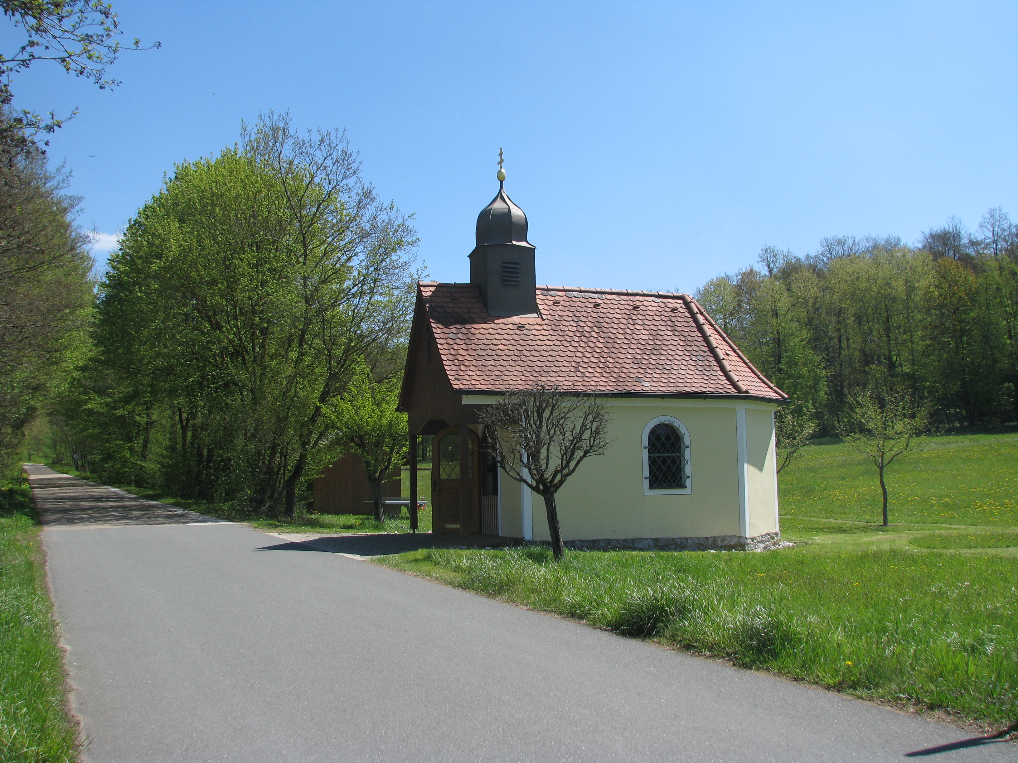 Ortskapelle von Unterwall / Oberwall, Ortsteile von Berg bei Neumarkt in der Oberpfalz